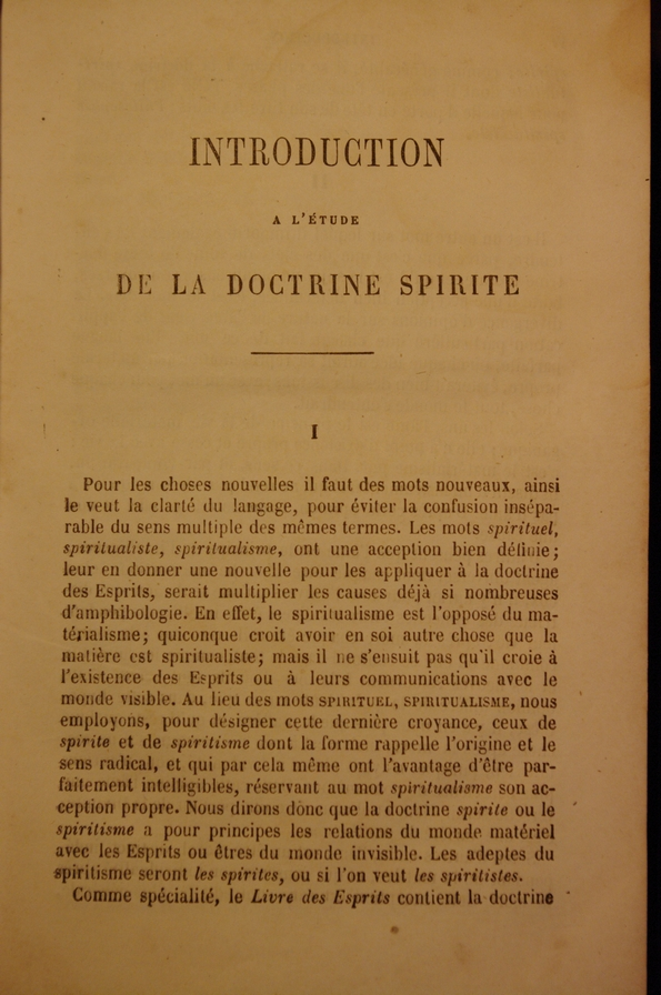 Première page de l'introduction du "Livre des Esprits" qui contient la toute première utilisation du mot "spiritisme" dans la littérature française.